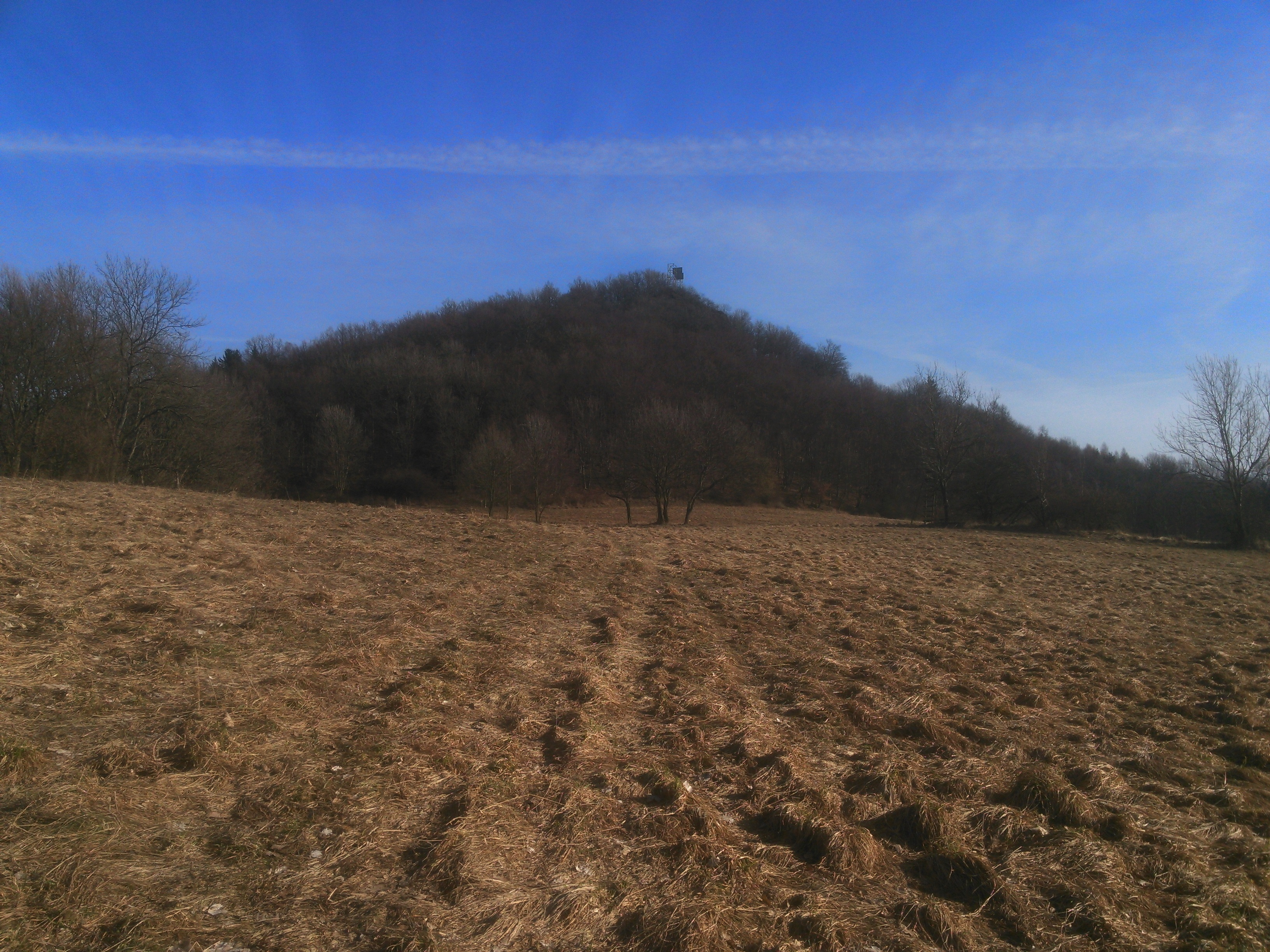 Klobouk u Děčína